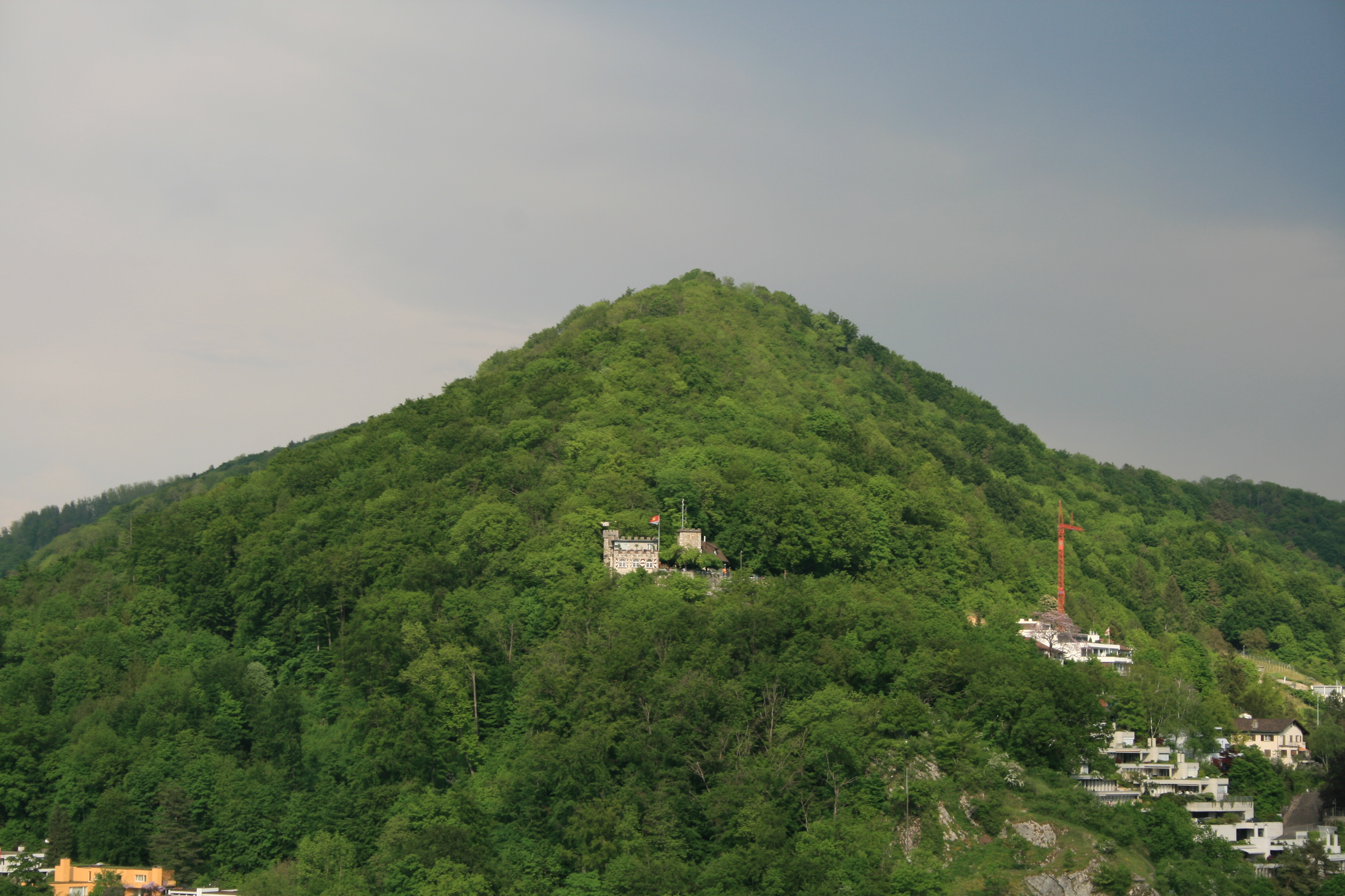 Lägern und Burg Schartenfels, Baden/Wettingen, Schweiz